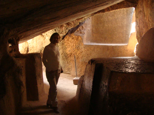 Altar subterraneo en el sitio arqueológico de Kenko, próximo al Cusco